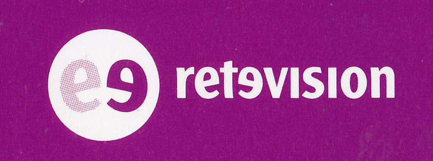 Logotipo de la corporación Retevisión escaneado de un folleto publicitario de 2001